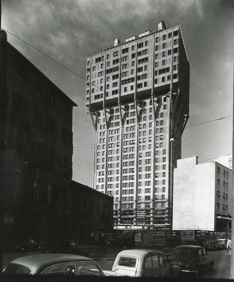 Servizio fotografico : Milano, 1960 / Paolo Monti. - Fototipi: 2 : Positivo b/n, gelatina bromuro d'argento/ carta, provino a contatto da pellicola 10x12. - ((La suddetta serie è contenuta nella scatola identificata con la numerazione 142; sul coperchio iscrizione manoscritta a pennarello: "Contatti 7a"